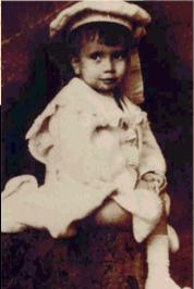 O poeta brasileiro Mário Quintana (1906-1994), quando criança.